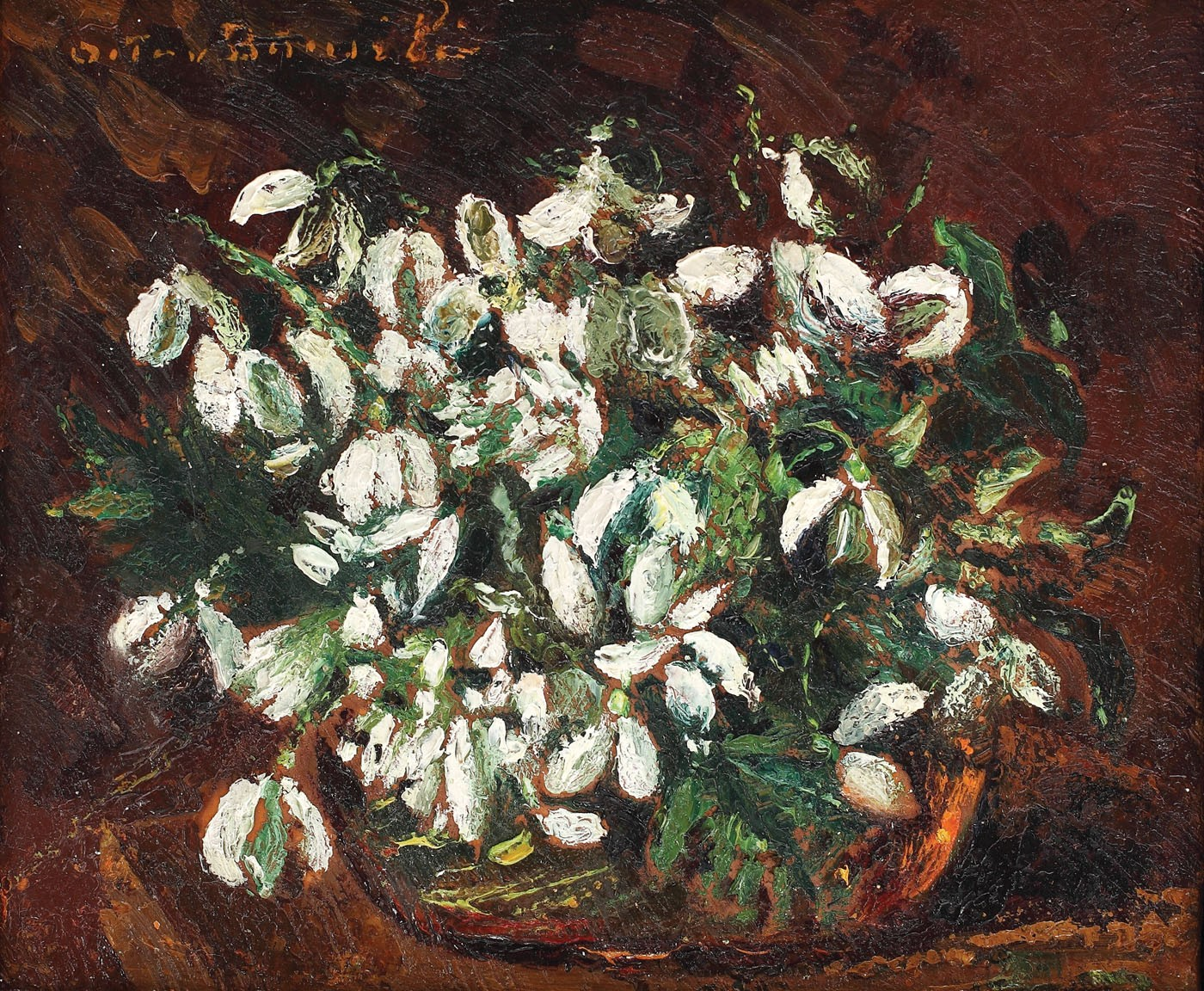 Ghiocei, ulei pe pânză, 23 × 27 cm, semnat stânga sus, cu galben, "Octav Băncilă"